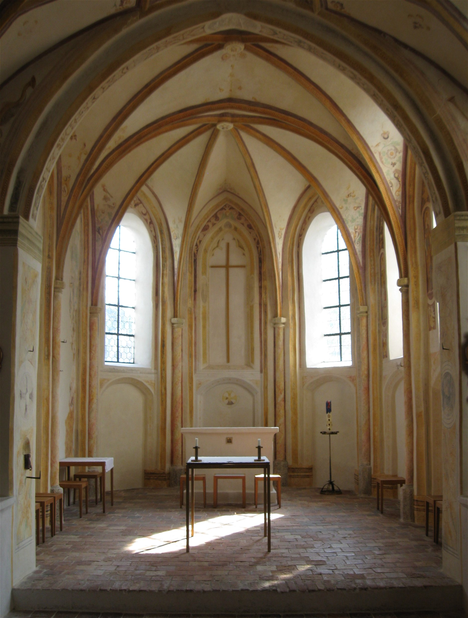 Klosterweg 12; Kirche St. Walburgis, einschiffiger gotischer Bau, 14./15. Jahrhundert, über Grundmauern der Kirche des ehemaligen Nonnenklosters, seit 1481 Pfarrkirche; mit Ausstattung; Kirchhofummauerung, wohl 16./17. Jahrhundert; im Friedhof Begräbnisstätten der Familie von Leuchtenberg, letztes Viertel 19. und erstes Viertel 20 Jahrhundert.